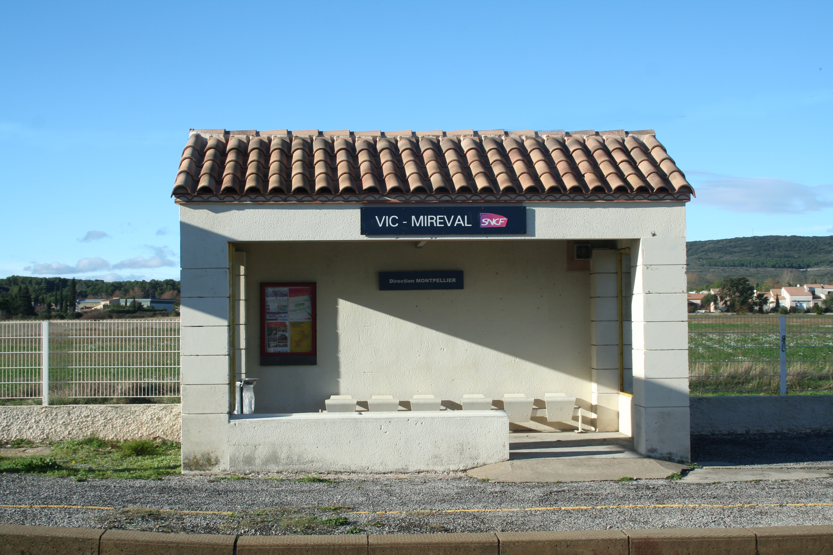 Mireval (Hérault) - gare de Vic - Mireval.